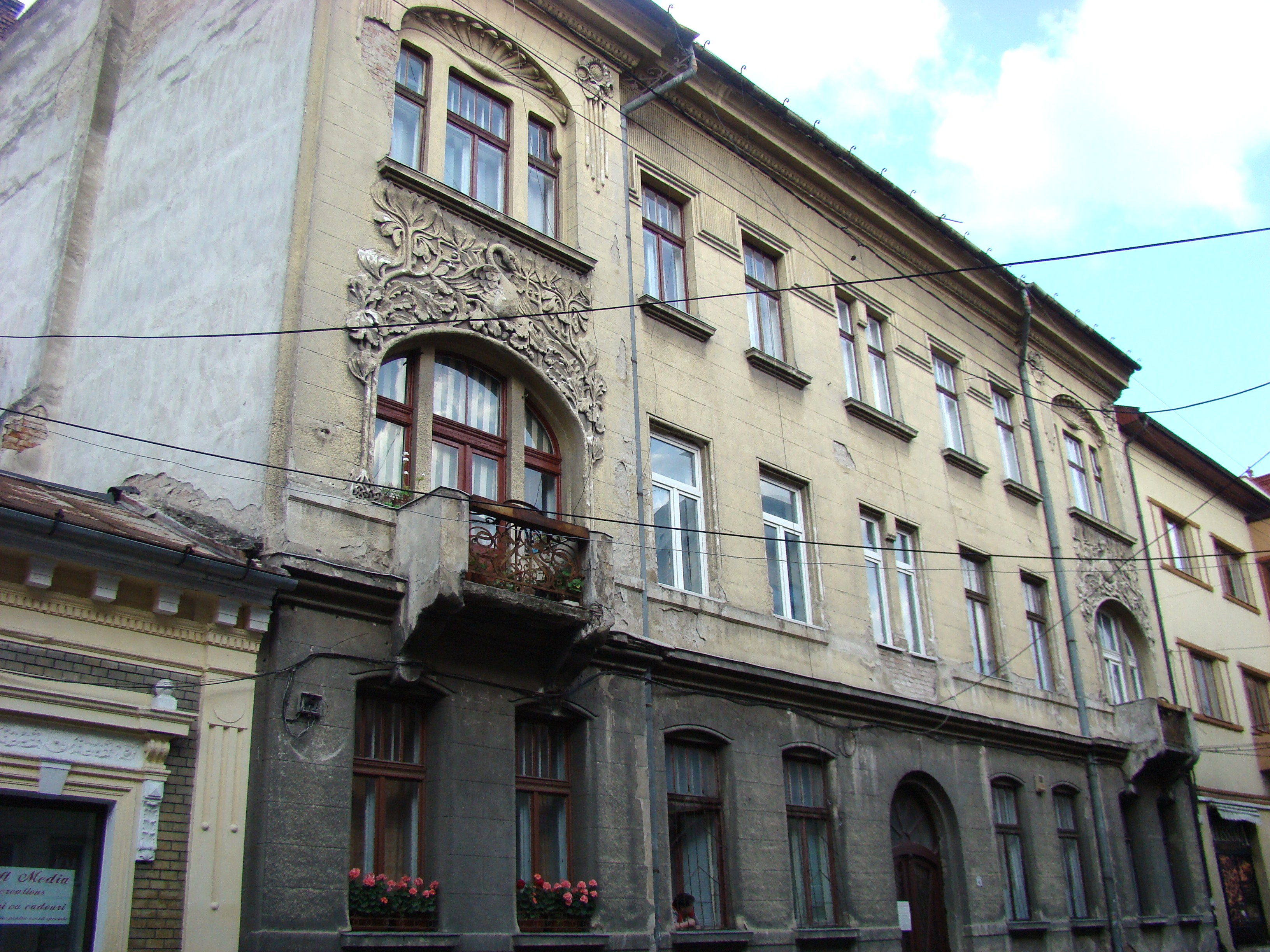 Clădire monument istoric, str. Emil Isac, nr.4